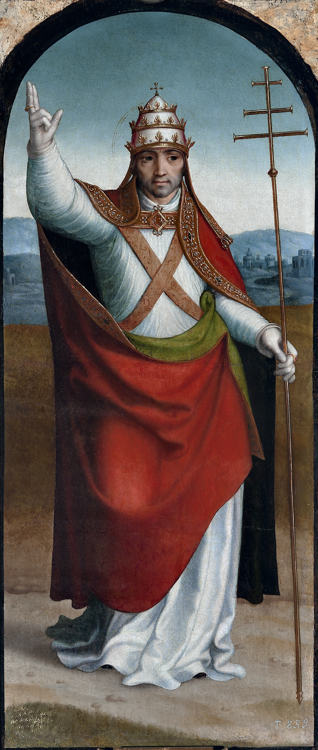 El personaje ha sido identificado como San Clemente, papa y mártir del siglo I (92-101), de origen judío, que fue convertido al cristianismo por San Pedro y que, según la tradición, sufrió el martirio siendo arrojado al Mar Negro con un ancla al cuello. La propagación de su culto se debe a los santos Cirilo y Metodio, que en el año 867 trasladaron sus restos a Roma. Se le representa siempre de pontifical, como en esta obra, en la que viste alba, estola y capa pluvial de color rojo y forro verde con orla y broche de pedrería, que cruza por delante y sujeta bajo el brazo. Va nimbado con una fina aureola circular y cubre su cabeza con la tiara papal de triple corona, de la que cuelgan las ínfulas. En las manos, enguantadas, luce sendos anillos de oro y rubíes; bendice con la derecha y porta en la izquierda una cruz patriarcal de triple travesaño. No le acompañan en esta ocasión ninguno de sus atributos característicos, con los que suele aparecer a partir de la Edad Media, que son el ancla, símbolo del martirio, una capilla rodeada de agua, en recuerdo de la que le construyeron los ángeles en el fondo del mar, y un Agnus Dei, en referencia a uno de sus milagros. El santo está efigiado de pie, en posición frontal, sobre un suelo terroso. Al fondo se divisa un paisaje montañoso con una ciudad de edificios clásicos de planta circular y poligonal, a la manera habitual del pintor. La composición remata en semicírculo; las enjutas no van decoradas y en origen irían cubiertas. La figura está dotada de cierto carácter escultórico. Su marcada frontalidad se ve compensada por el suave movimiento del cuerpo y los plegados de sus vestiduras, por la disposición en diagonal de sus brazos, en línea con la estola cruzada, y por la leve desviación lateral de su mirada (Texto extractado de Cortes Hernández, S.; Ocaña Rodríguez, E. en: Juan Correa de Vivar, c. 1510-1566. Maestro del Renacimiento español, 2010).